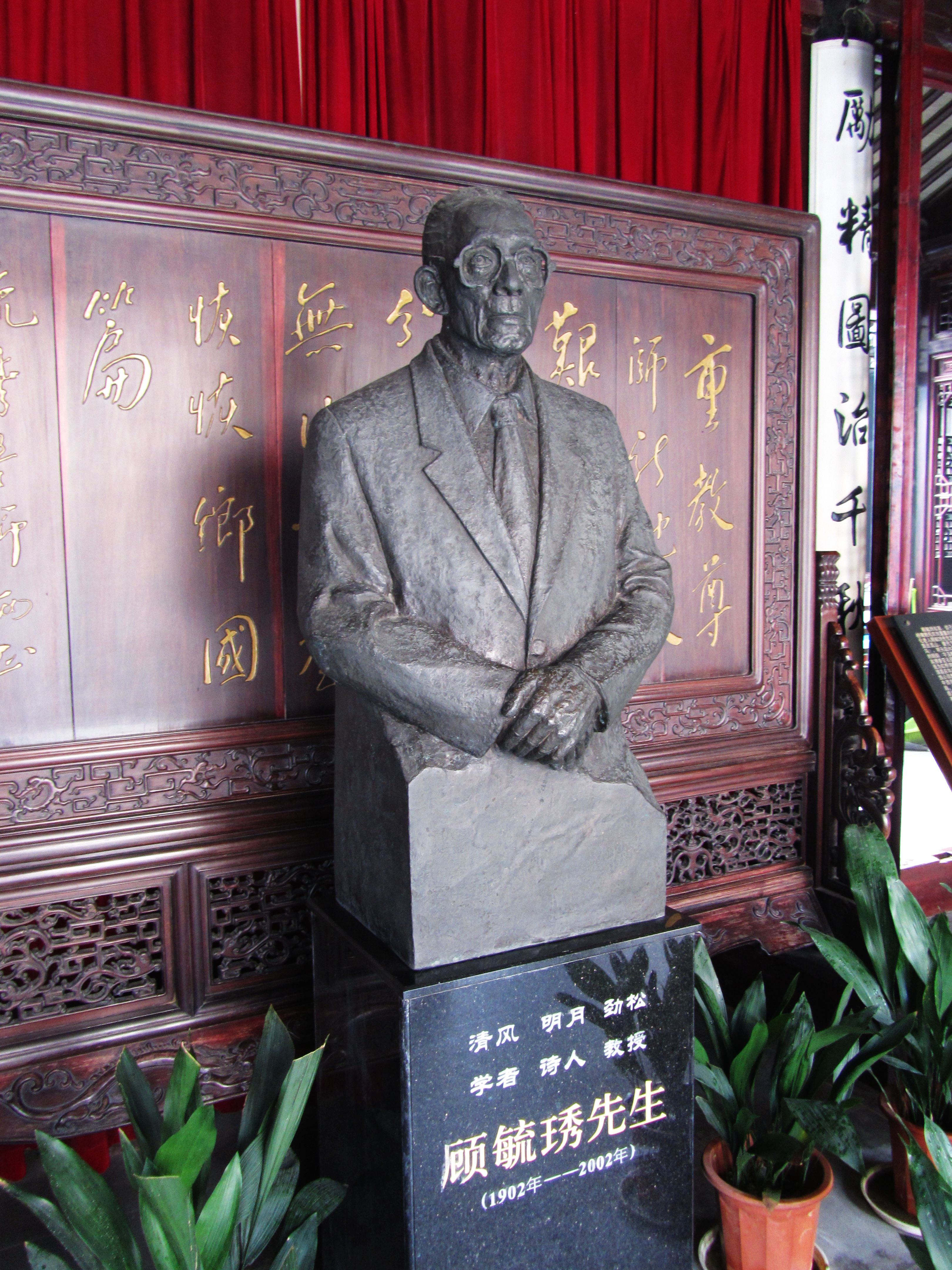 无锡学前街3号顾毓琇故居大门内的顾毓琇半身像。